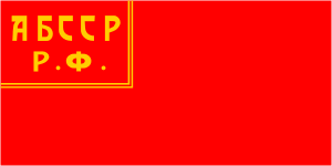 Флаг Башкирской ССР (1925-1937)